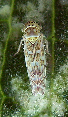 Ligurische Blattzikade (Eupteryx decemnotata) an Echter Katzenminze (Nepeta cataria), Länge der Zikade etwa 2,5 Millimeter; Garten in Niedersachsen